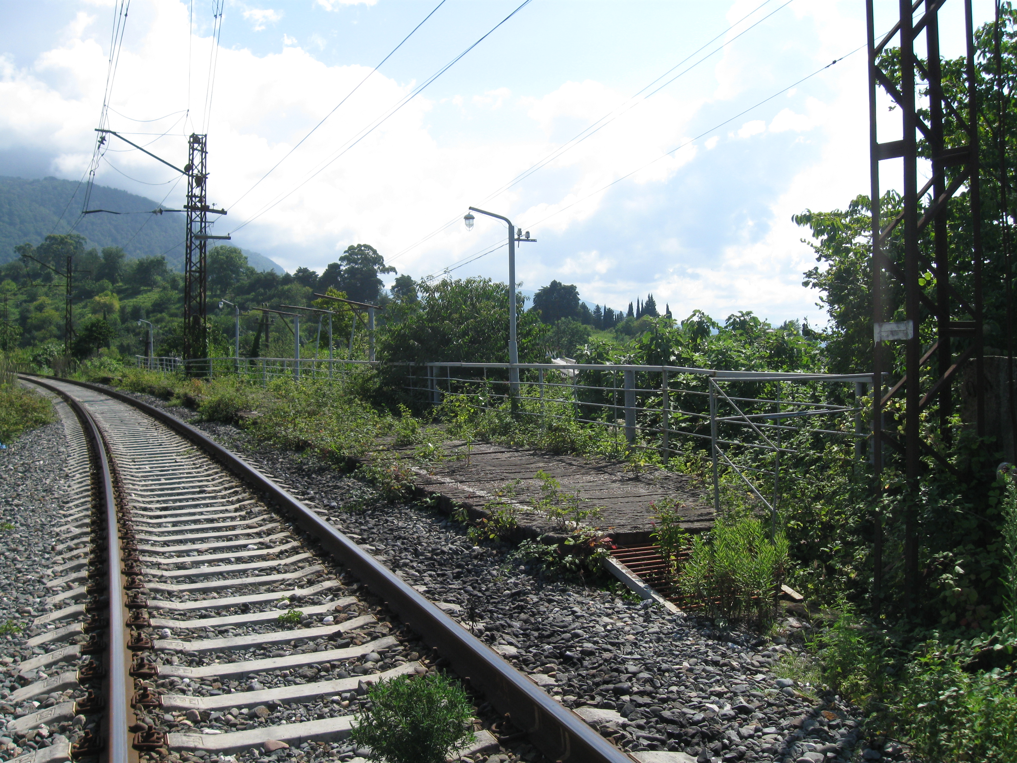 Железнодорожная платформа Лапста, Абхазия Татарча/tatarça: Лапста тимер-юл платфомасы, Абхазия Республикасы